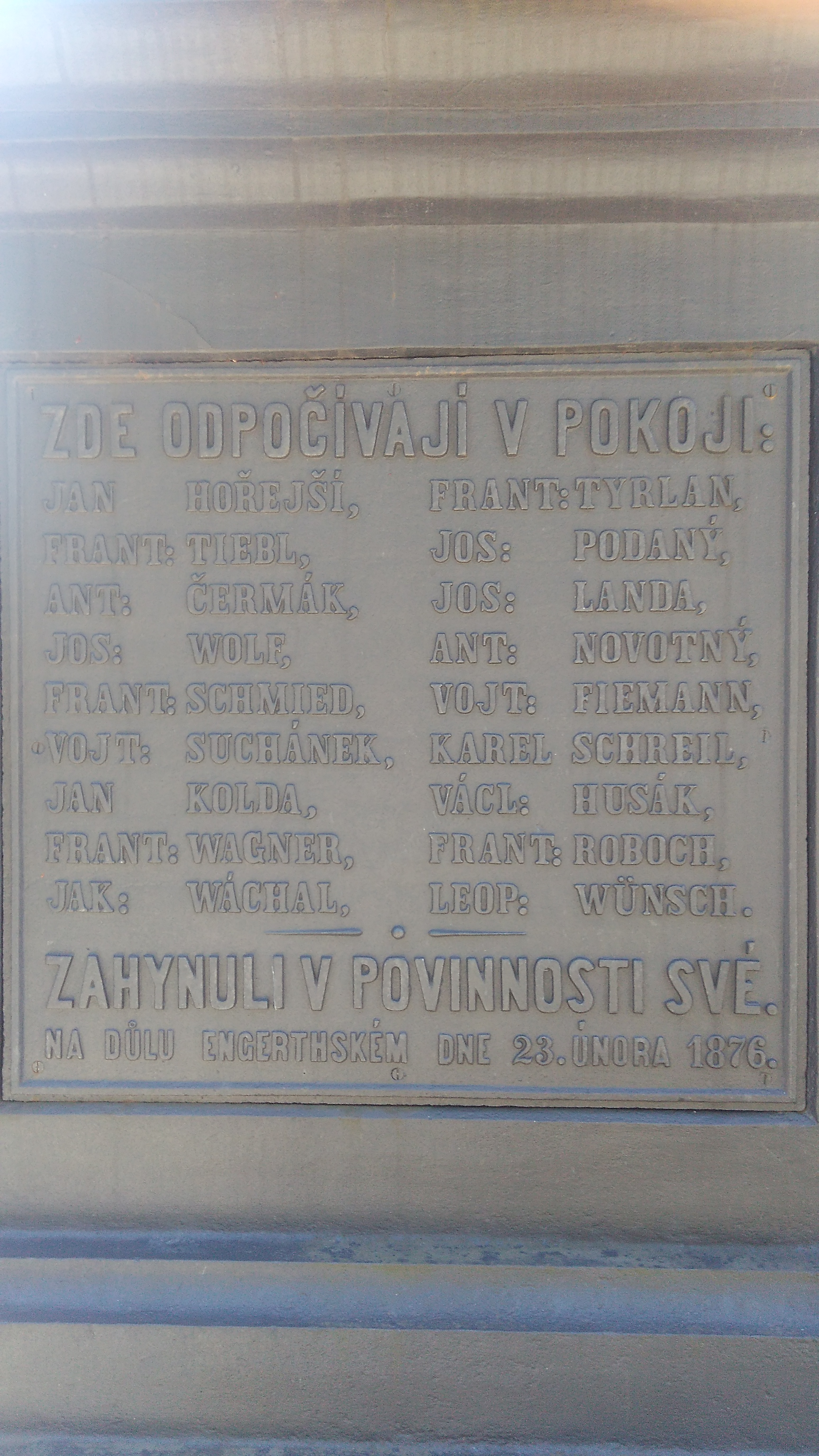 horníci